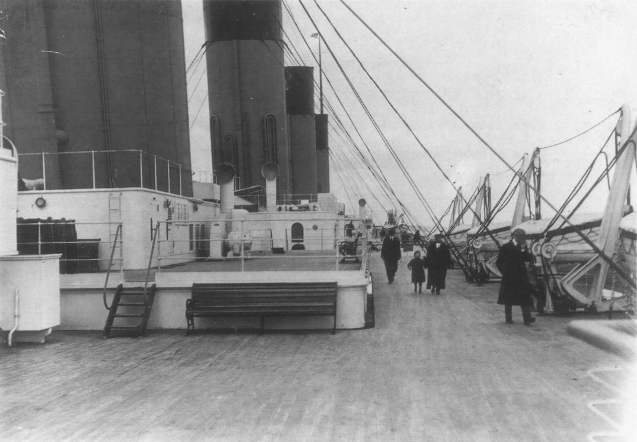 Шлюпочная палуба Титаника и променад II класса